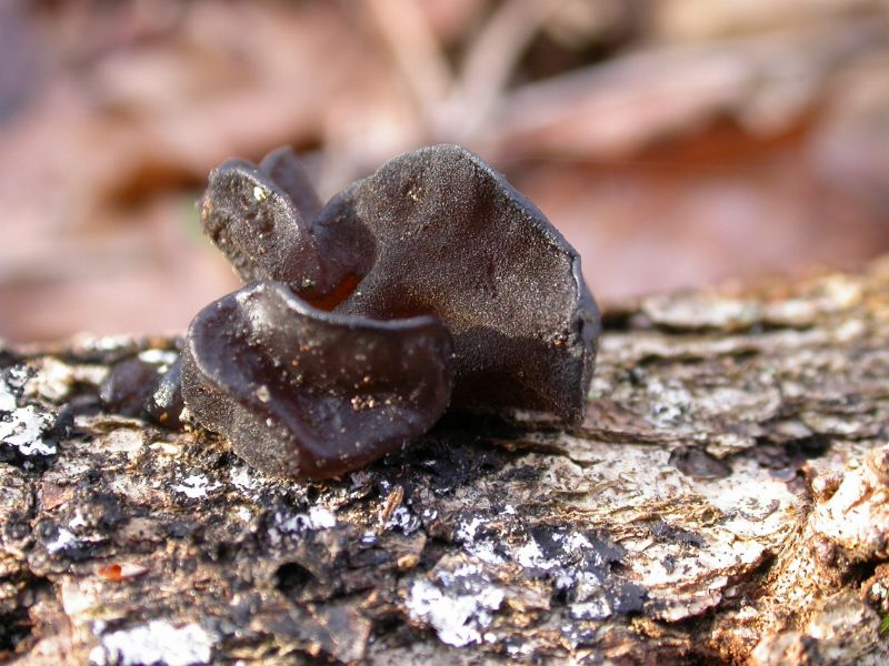 Exidia glandulosa, Gradignan, France, 3 février 2007